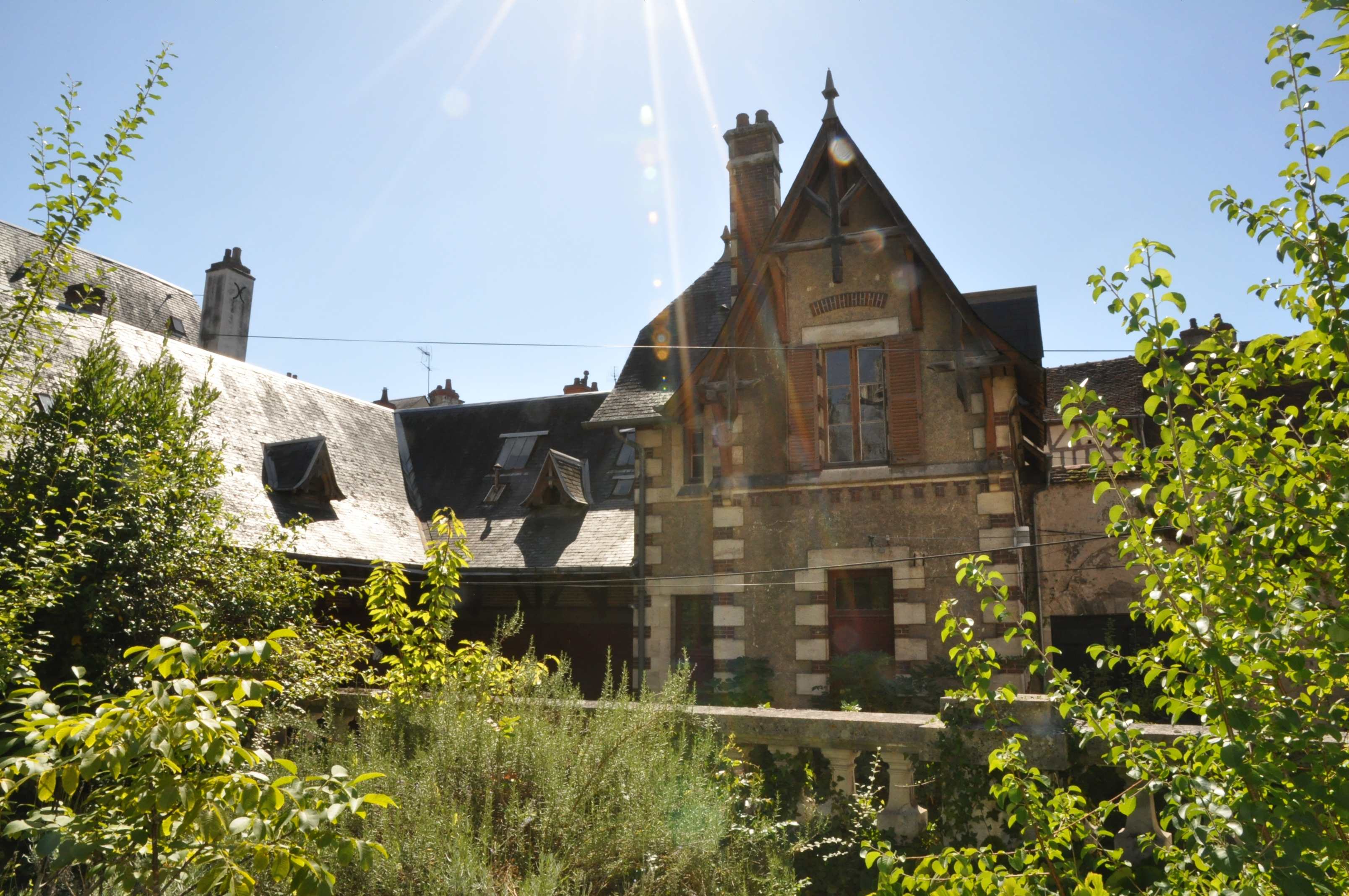 maison appt